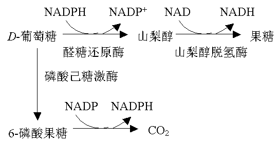 多元醇通路示意图